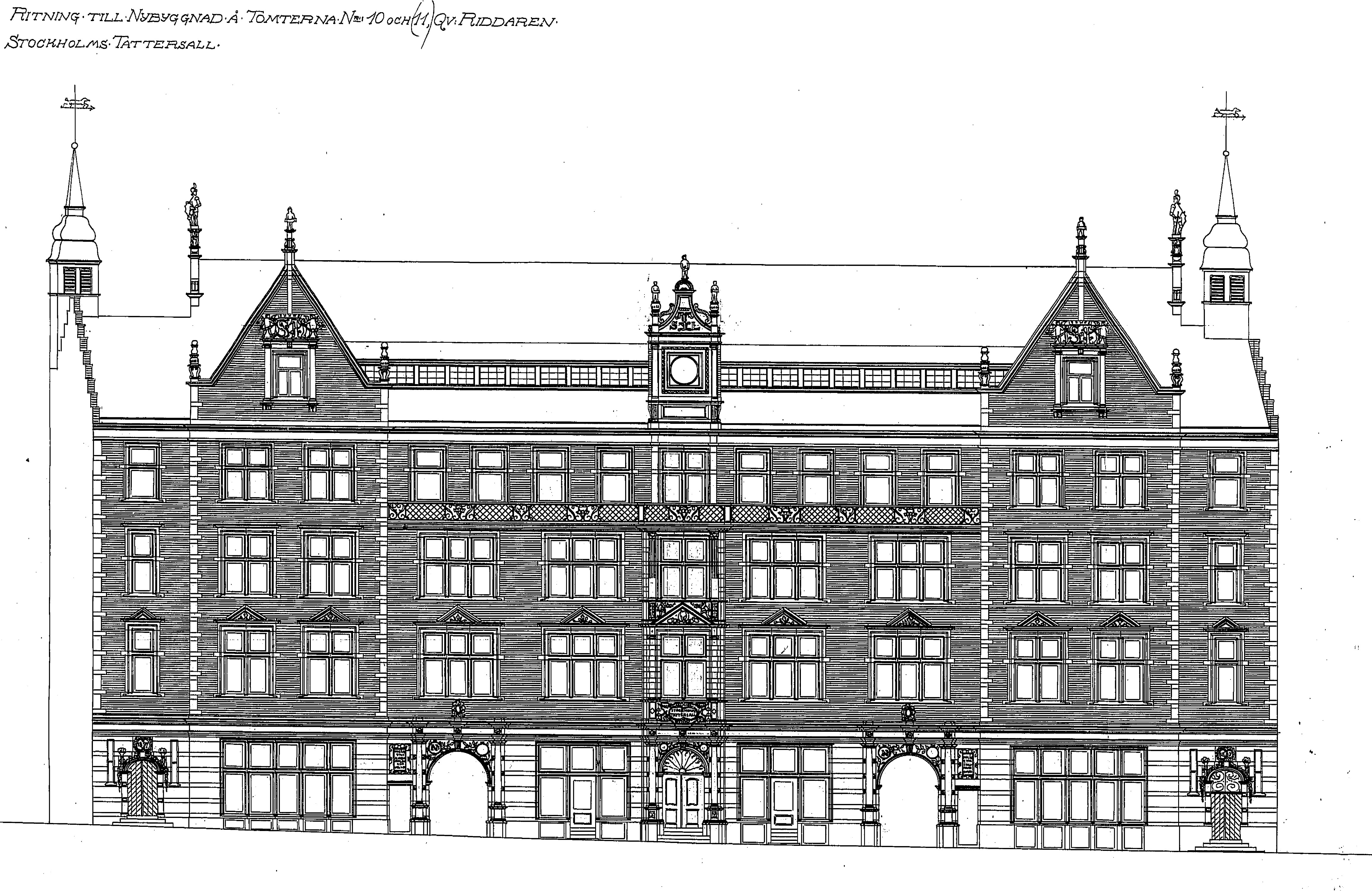 Tattersall, ritning, fasad mot Grev Turegatan